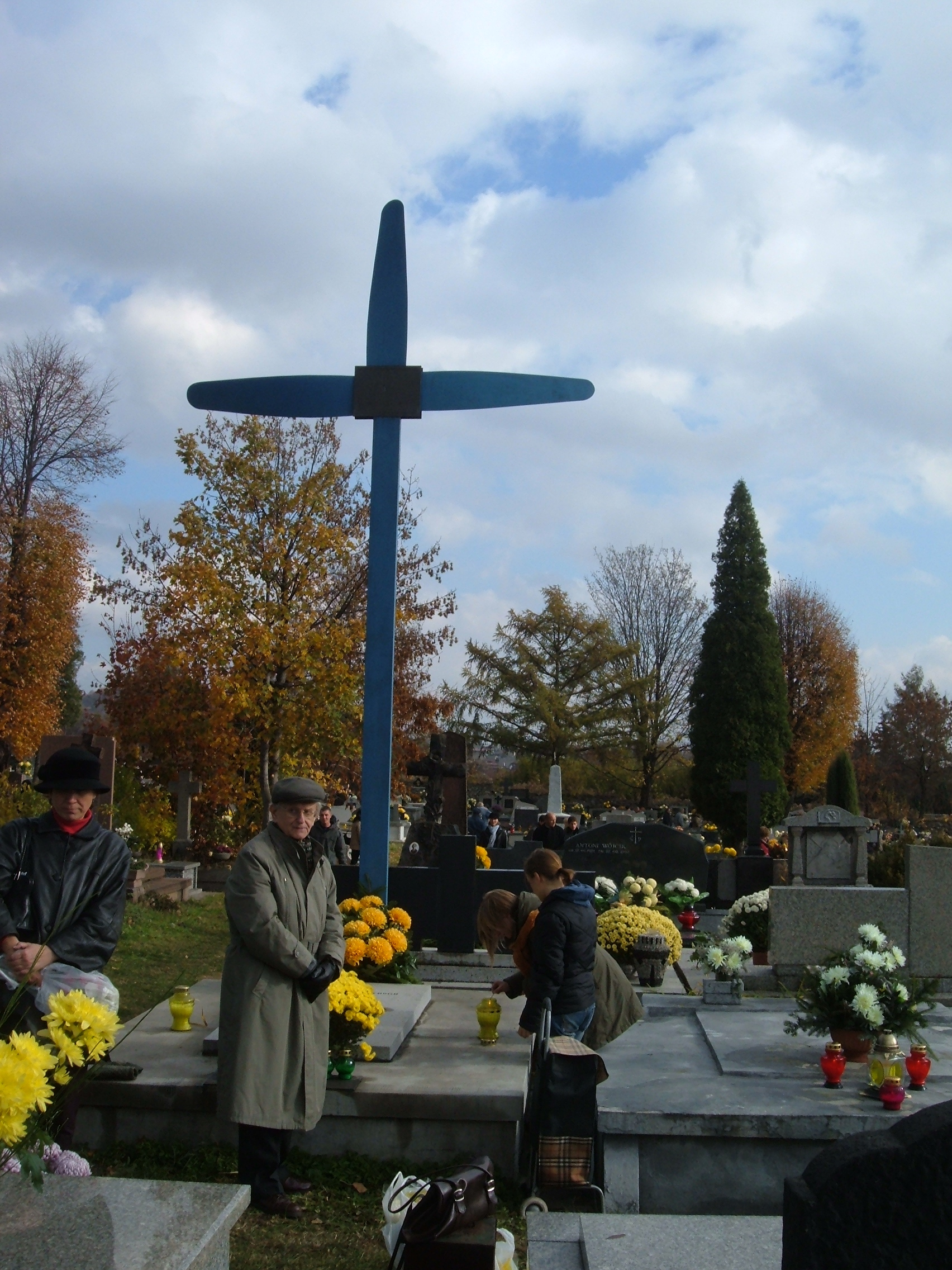 Grób Edwarda Szwai na cmentarzu w Grodźcu (Będzin). Przy grobie stoi Cezary Chlebowski